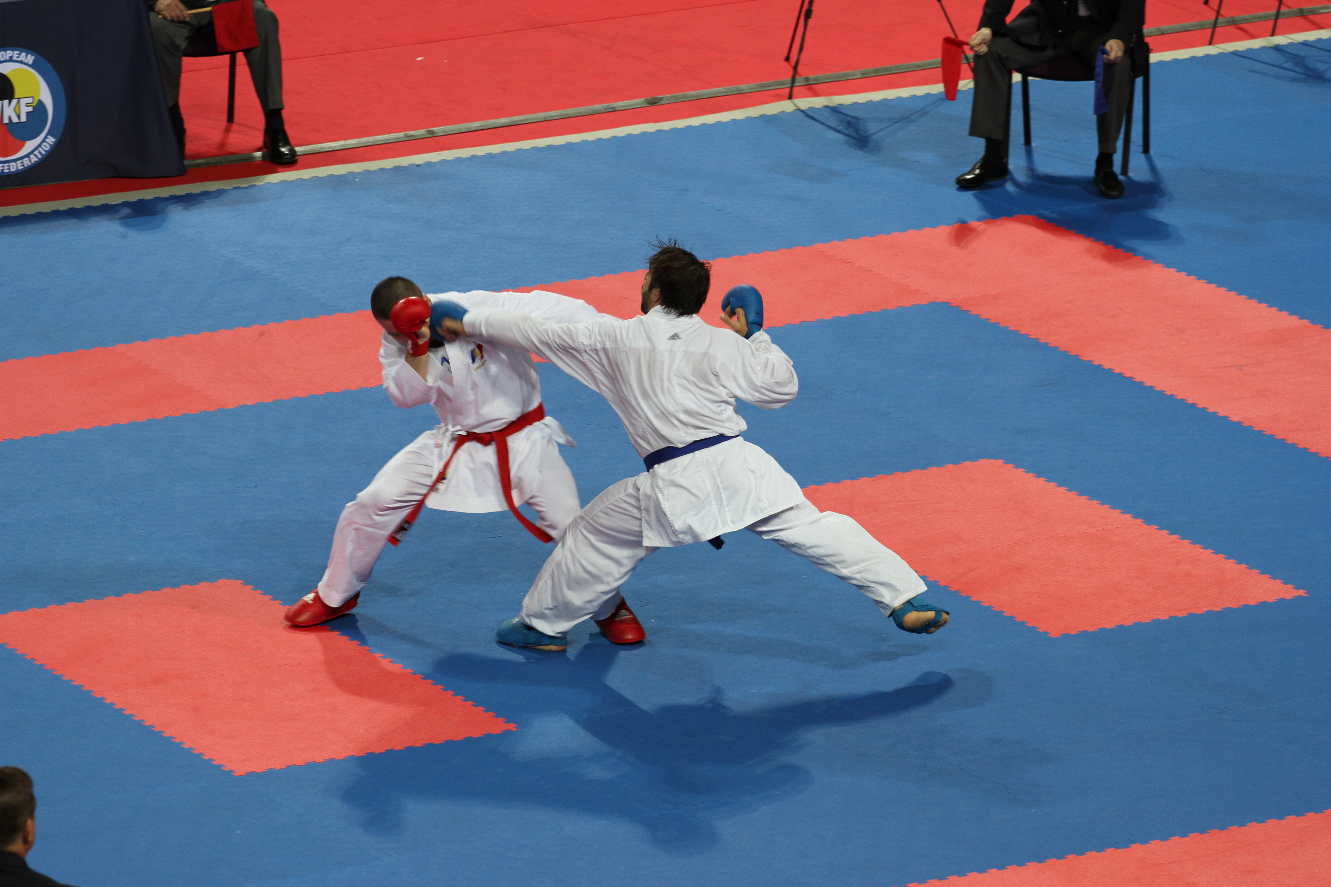 Rəfael Ağayev "the Panther of the East" im Sprung gegen Logan Da Costa (FR)